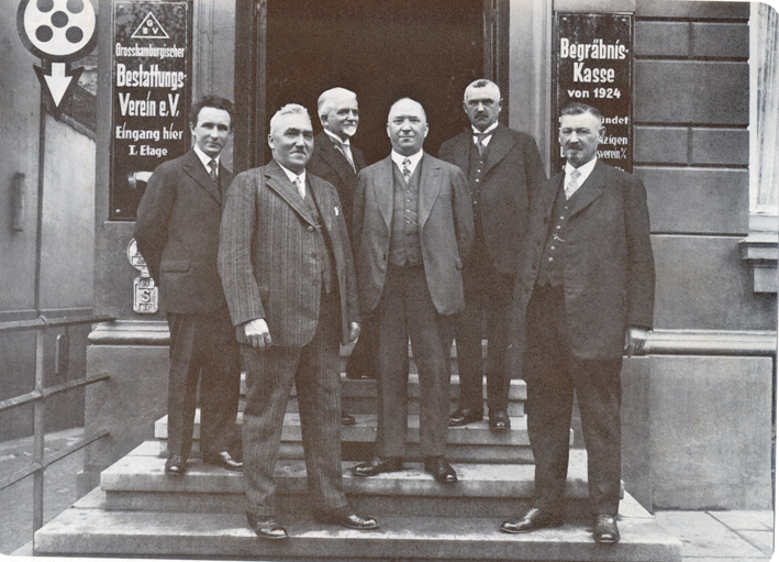 Gründer des GBI Großhamburger Bestattungsinstitut in Hamburg um ca. 1920